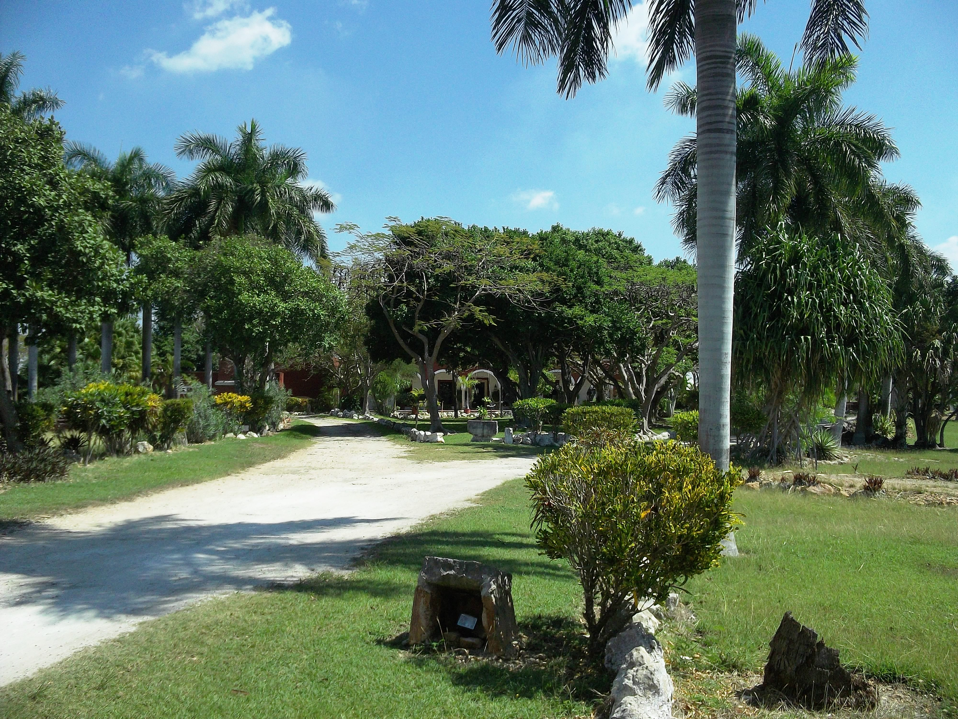 Hacienda San Antonio Cucul, Yucatán.